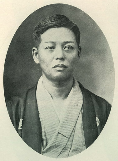 Bân-lâm-gú: Tân Hông-bêng 陳鴻鳴